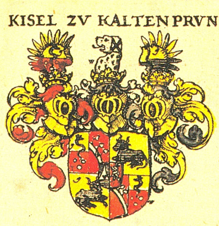 Wappen der 1554 geadelten Khiesel (Khisl, Kiesel, u. ä.) zu Kaltenbrunn; 1590 von Kaiser Rudolf II. in den Freiherrnstand erhoben; in: Johann Siebmacher: New Wappenbuch eingescannt aus: Horst Appuhn (Hrsg.), Johann Siebmachers Wappenbuch. Die bibliophilen Taschenbücher 538, 2. verb. Aufl , Dortmund 1989 Freiherren und Herren Blatt 30